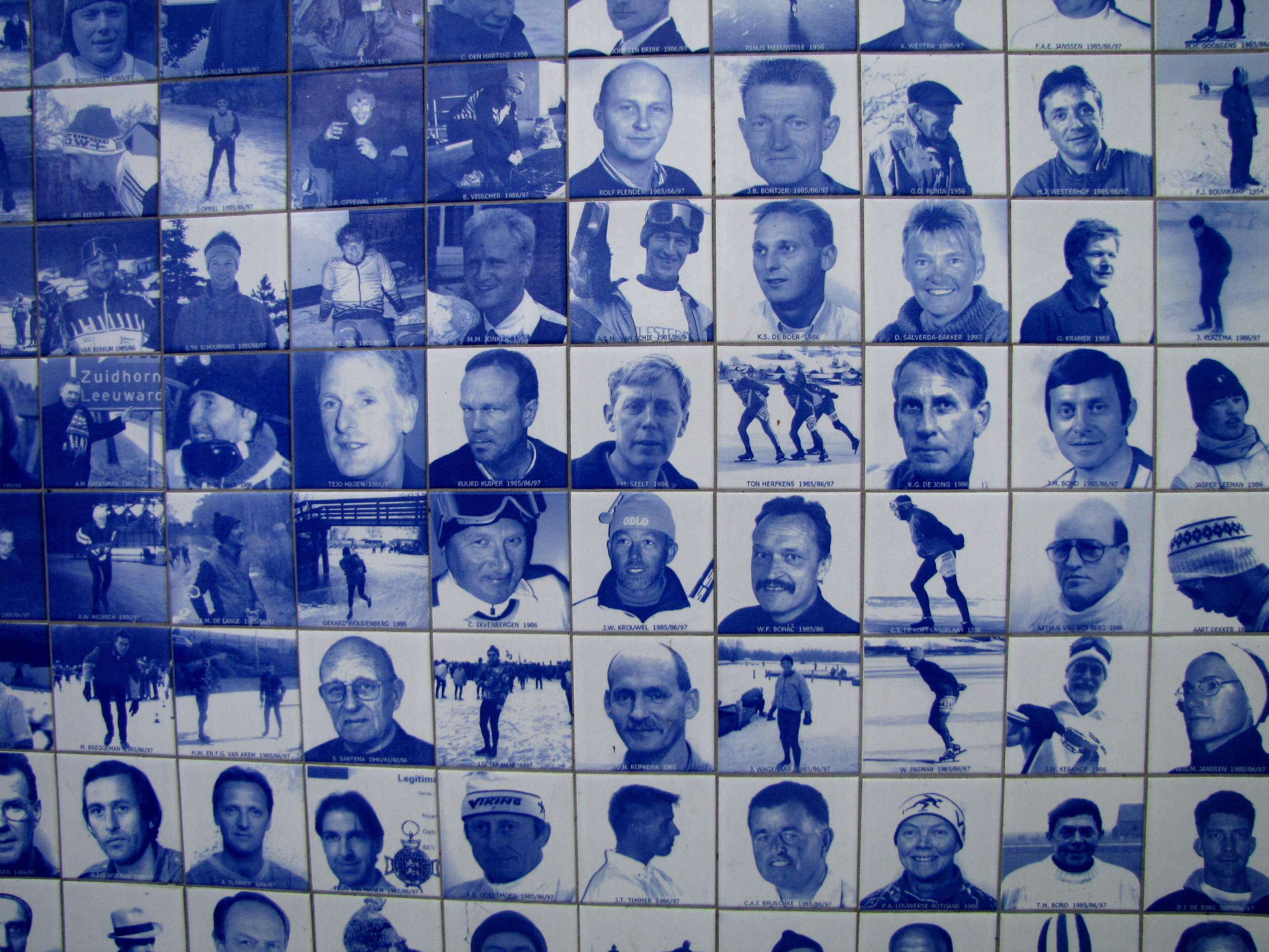 Denkmal für die Elf-Städte-Tour in Friesland, gelegen bei Giekerk (Gemeinde Tietjerksteradeel). Das Denkmal ist eine Brücke, die mit blau-weißen Kacheln bedeckt ist. Von weitem sieht man Schlittschuhläufer, von nahem erkennt man, dass die Kacheln jeweils einen Schliffschuhläufer abbilden, der historisch an einer Elf-Städte-Tour teilgenommen hat.